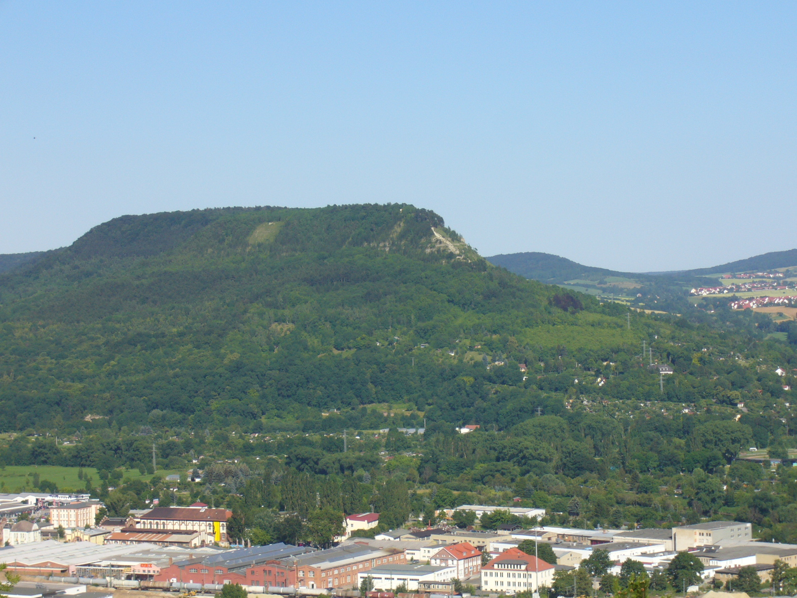 Jenzig in Jena (Germany)